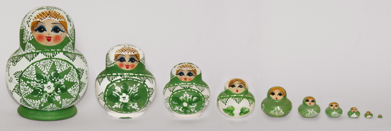 Матрьошки една в друга,виждаме как можем да решим алгоритъм като решаваме по-малка част от същия проблем,докато не стане прекалено малък,че да го решим директно.